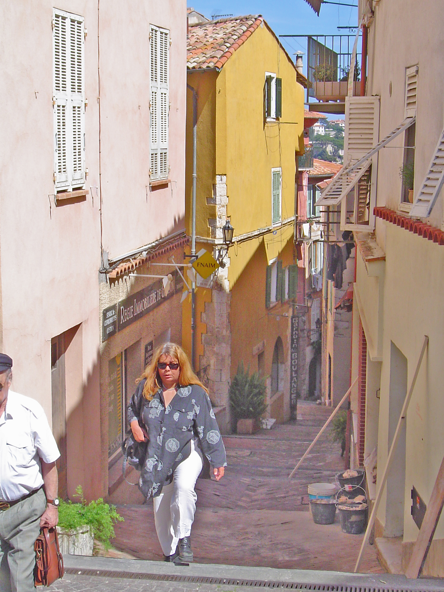 Enk Gaass zu Villefranche Source:Eege Foto vum opgehellt vum Cornischong